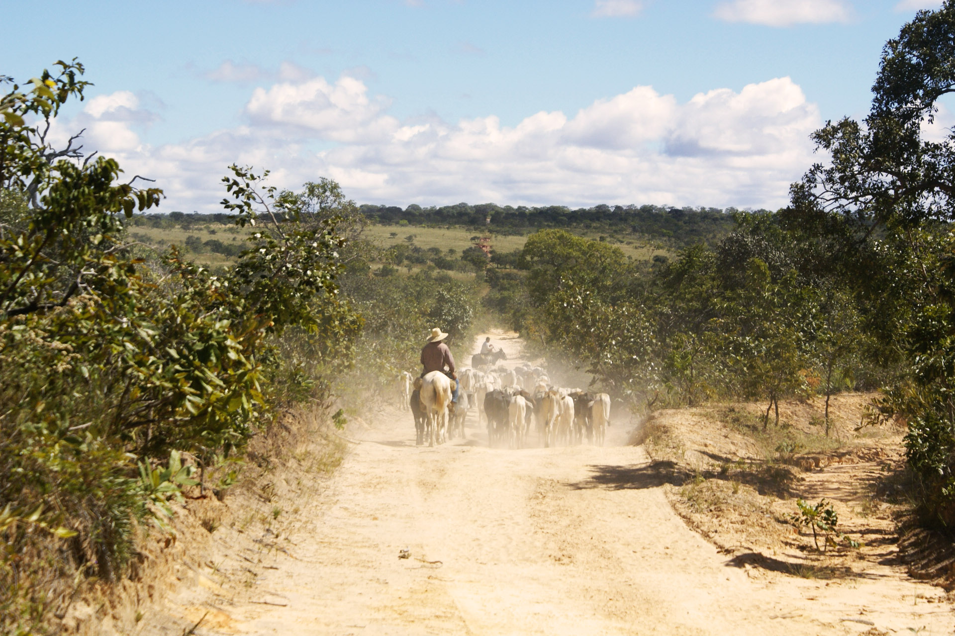 Caminho dentro do Parque Nacional do Grande Sertão Veredas, com a terra seca, e um homem tocando a boiada. Tudo muito seco.